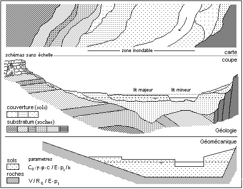 Modèles